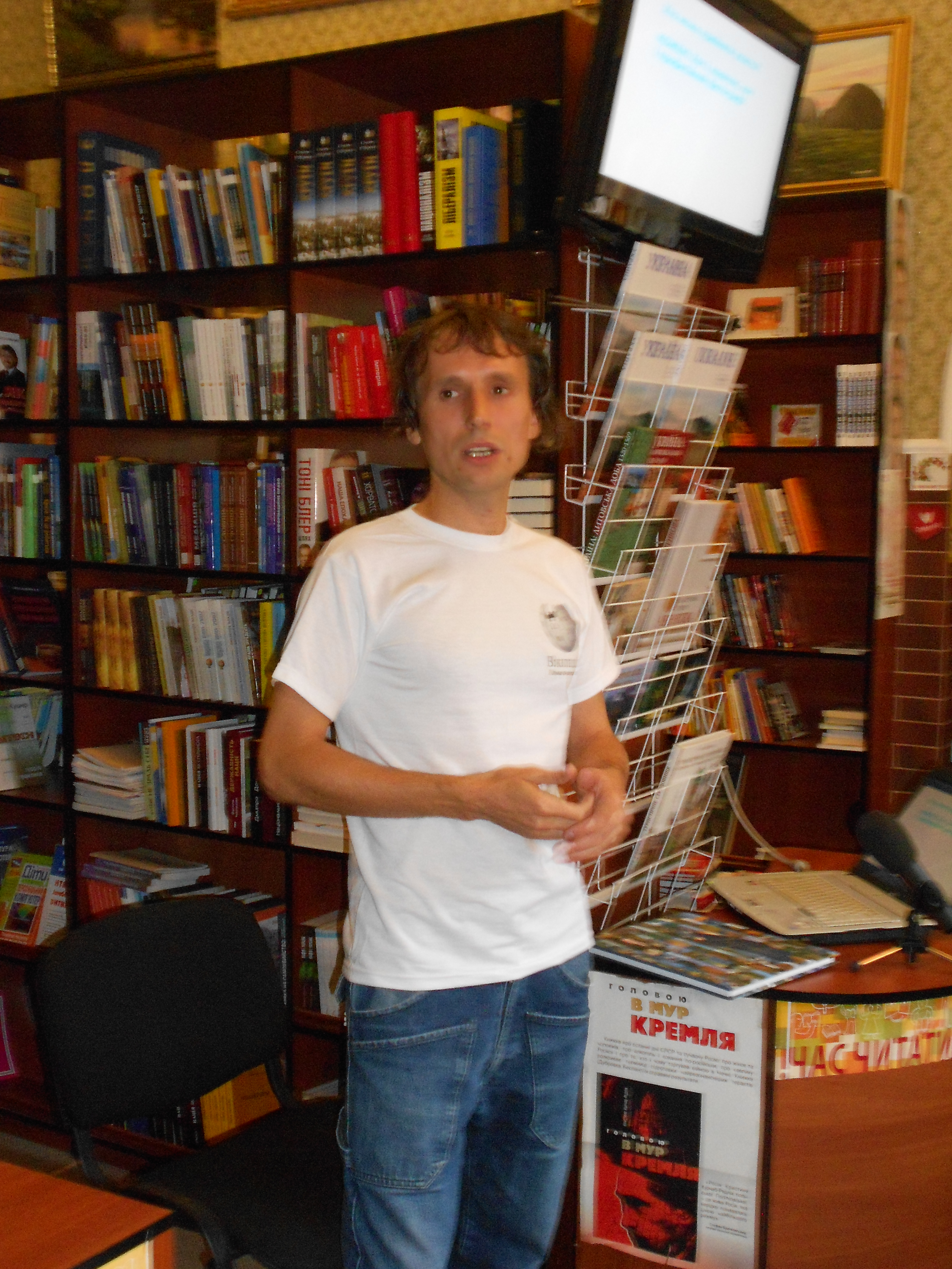 Презентация к старту фотоконкурса "Вики любит памятки 2013" в Украине. Чернигов, 30 августа 2013 года